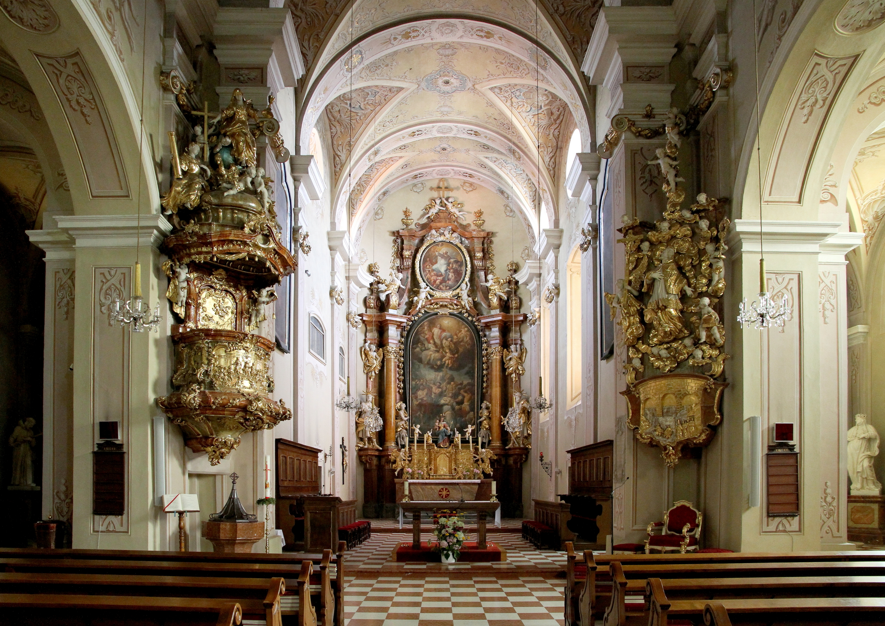 Innenansicht Richtung Chor der katholischen Pfarrkirche hl. Stephan in der niederösterreichischen Marktgemeinde Kirchberg am Wagram.